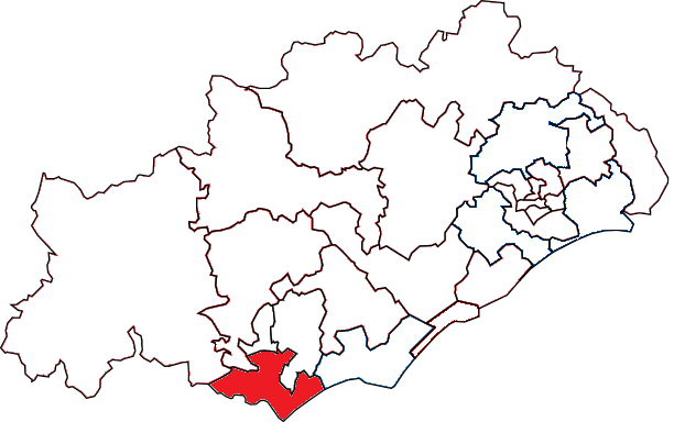 Situation du canton dans le département de l'Hérault